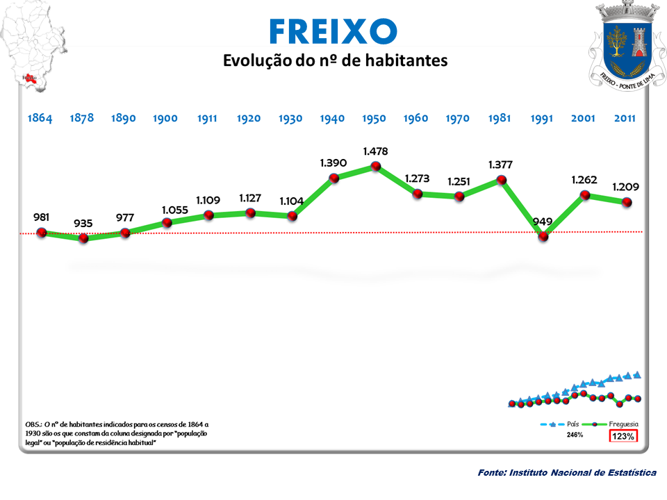 Cenos 1864/2011